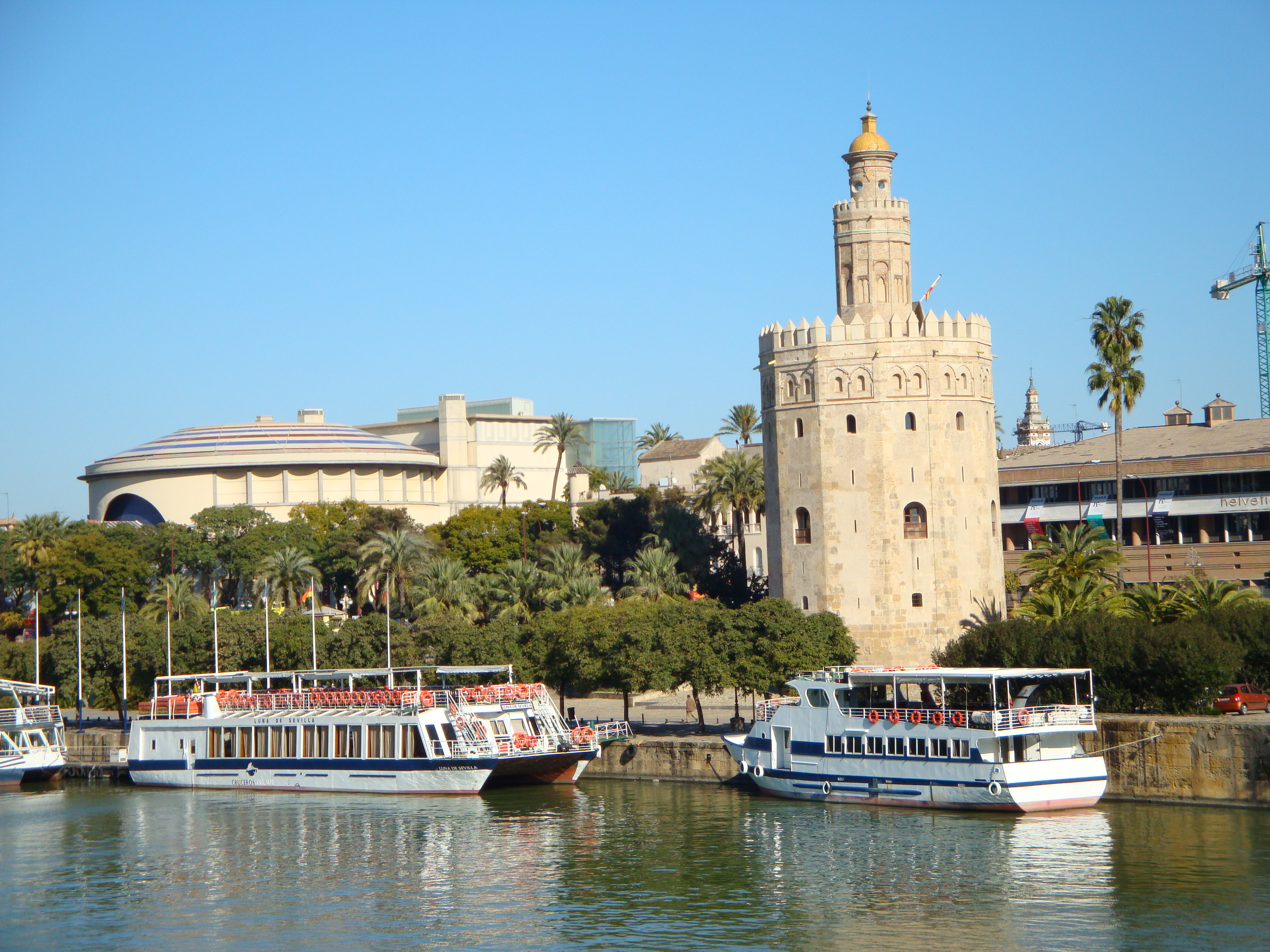 Torre del Oro y Teatro de La Maestranza vistos desde el puente San Telmo (Sevilla)